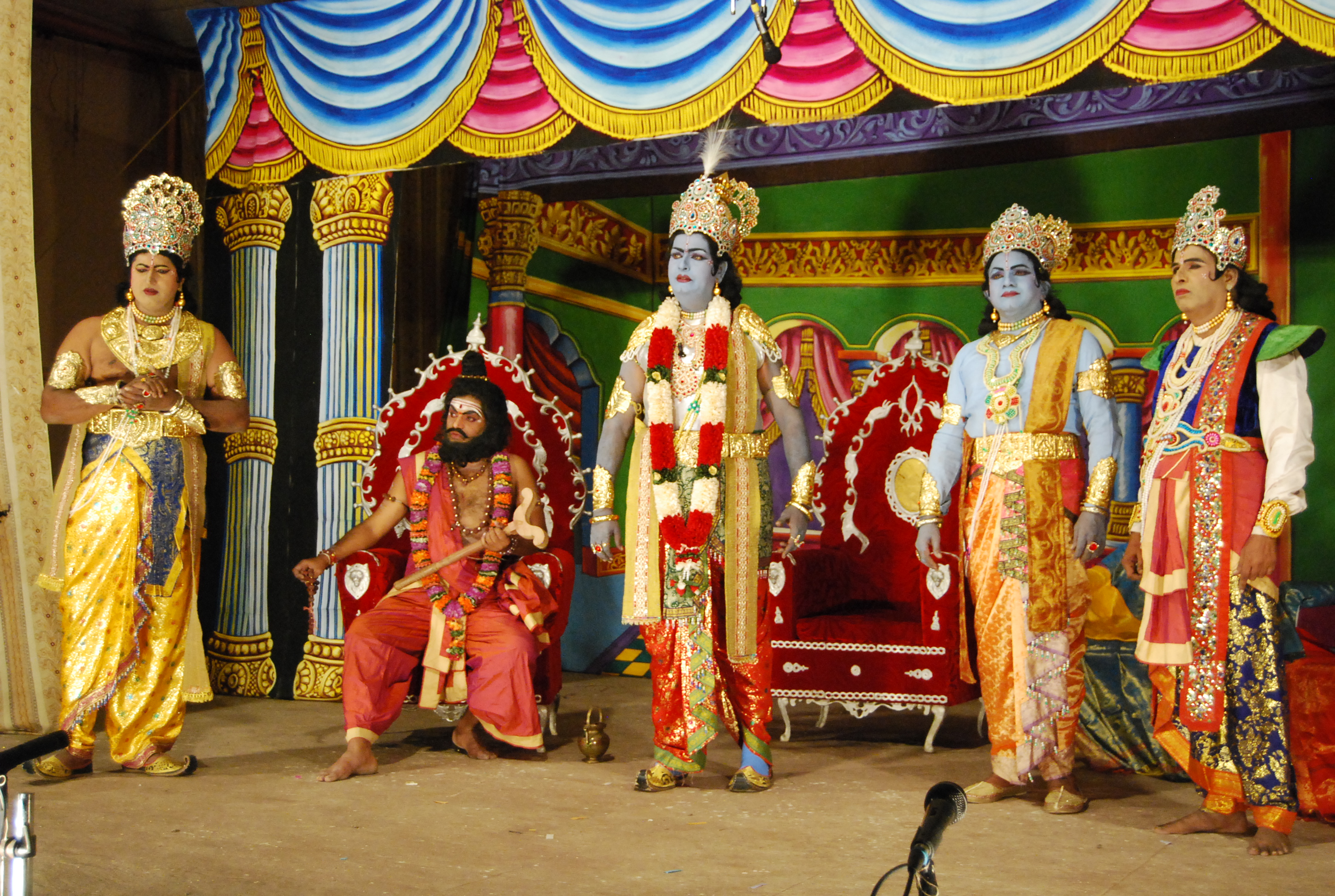 శ్రీ రామాంజనేయ యుద్ధం నాటకంలో శ్రీ రాముడు పందిళ్ళ శేఖర్ బాబు,లక్ష్మణుడు దేవర్రాజు రవీందర్ రావు,భరతుడు ఆకుల సదానందం,శతృఘ్నుడు ఎం.వి.రామారావు,విశ్వామిత్రుడు ఎన్.సుబ్బరాజు.